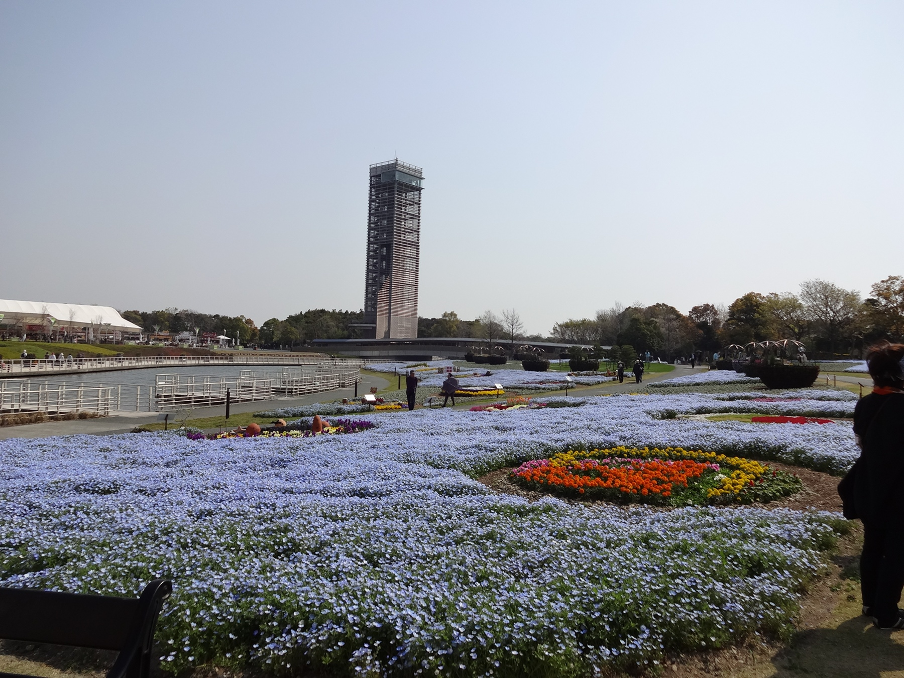 浜名湖花博2014の浜名湖ガーデンパーク会場展示 「花銀河」